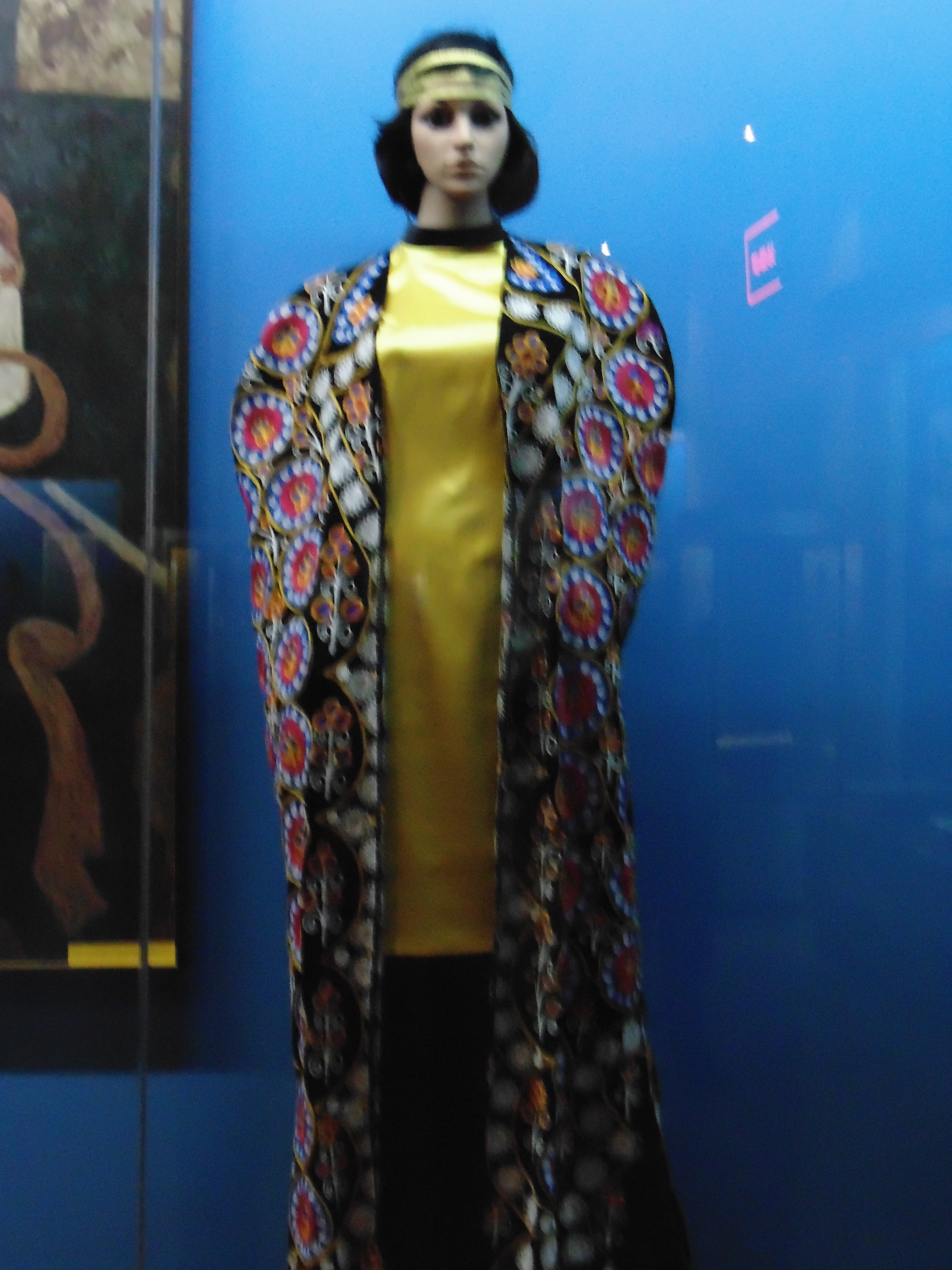 Бактрийская женская одежда Кафирниган (Таджикистан). Экспонат находится в Национальном музее Таджикистана г Душанбе